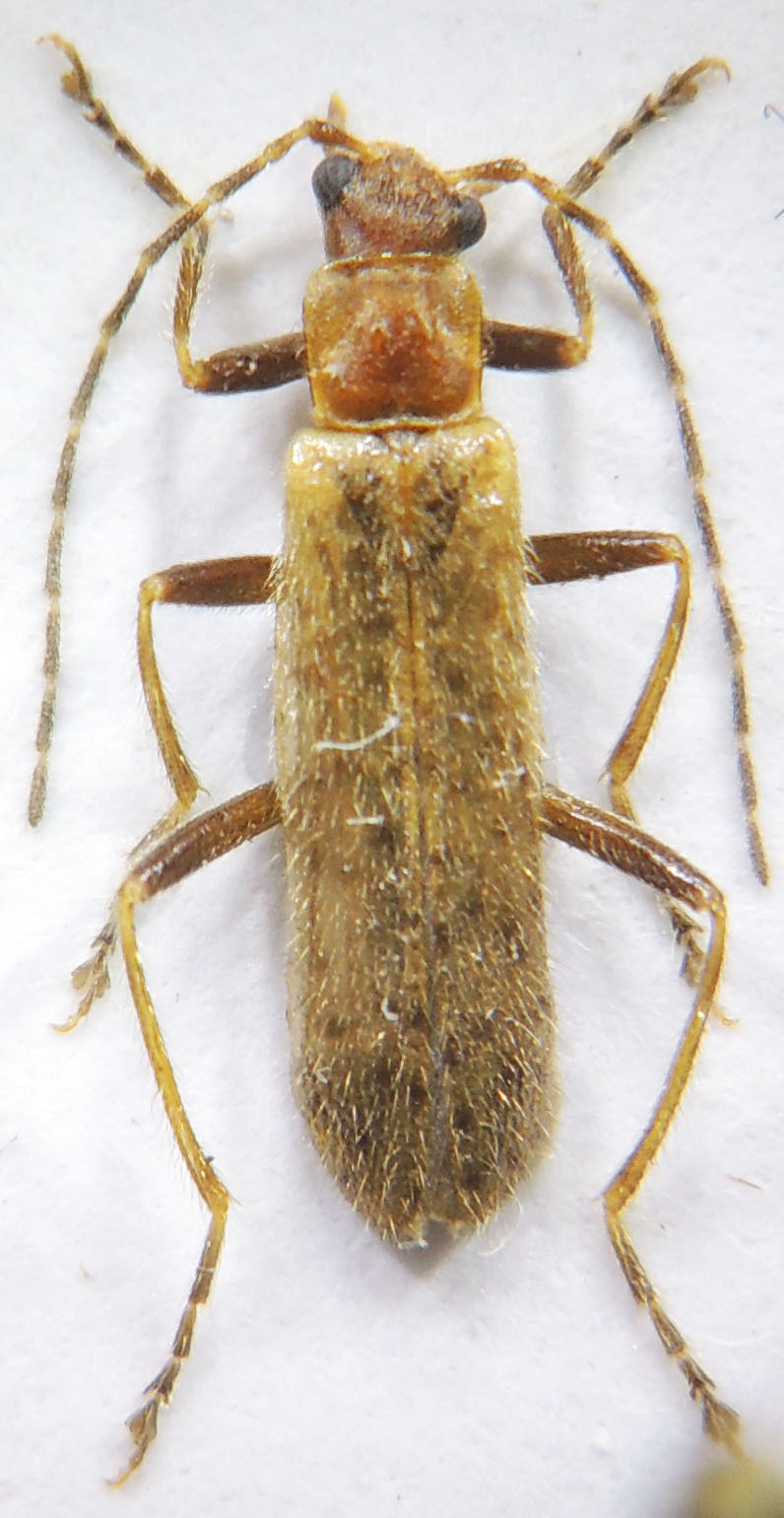 中文（台灣）: 鄒狹胸菊虎